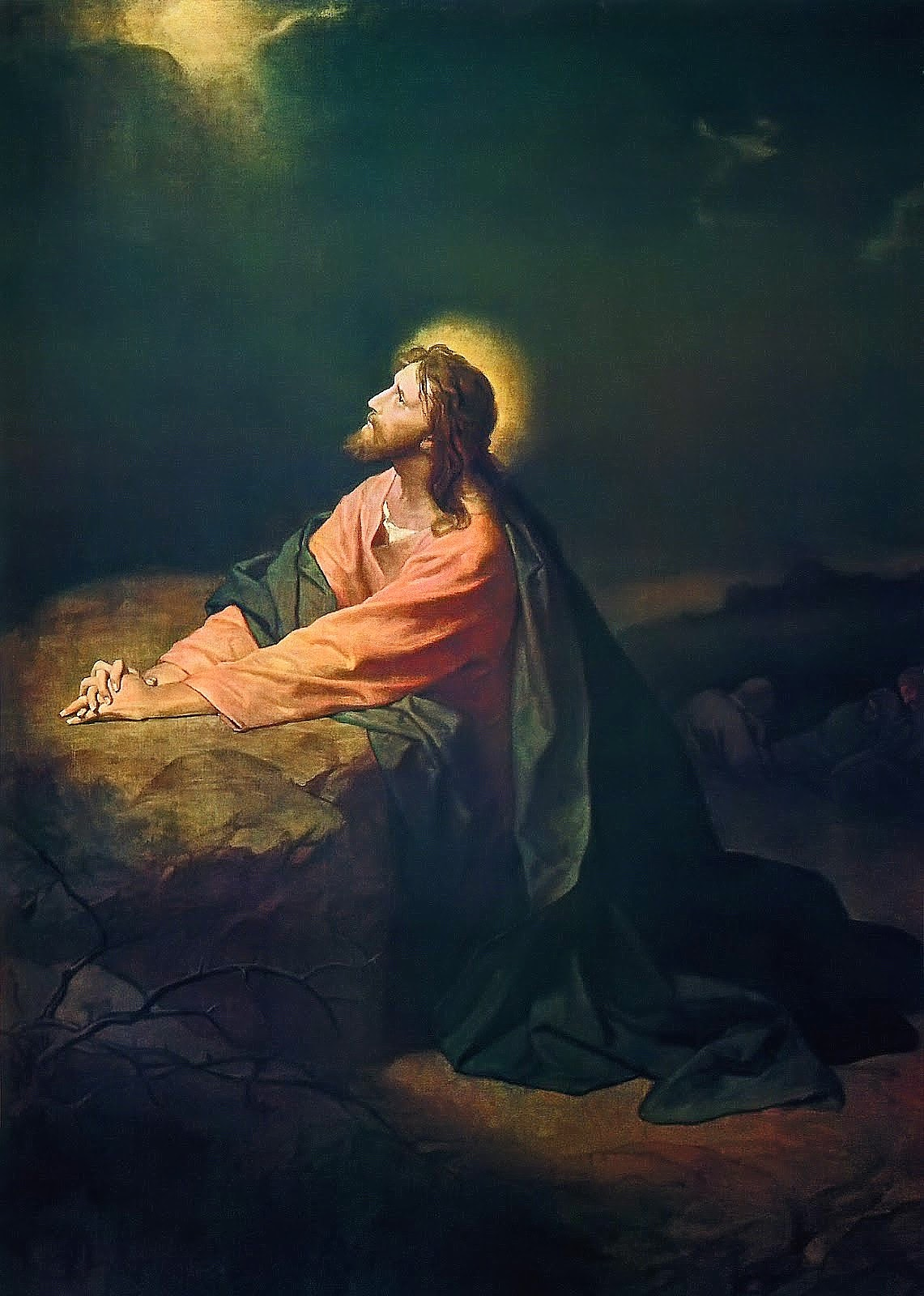 Christ in Gethsemanelabel QS:Len,"Christ in Gethsemane" label QS:Lde,"Christus in Gethsemane"